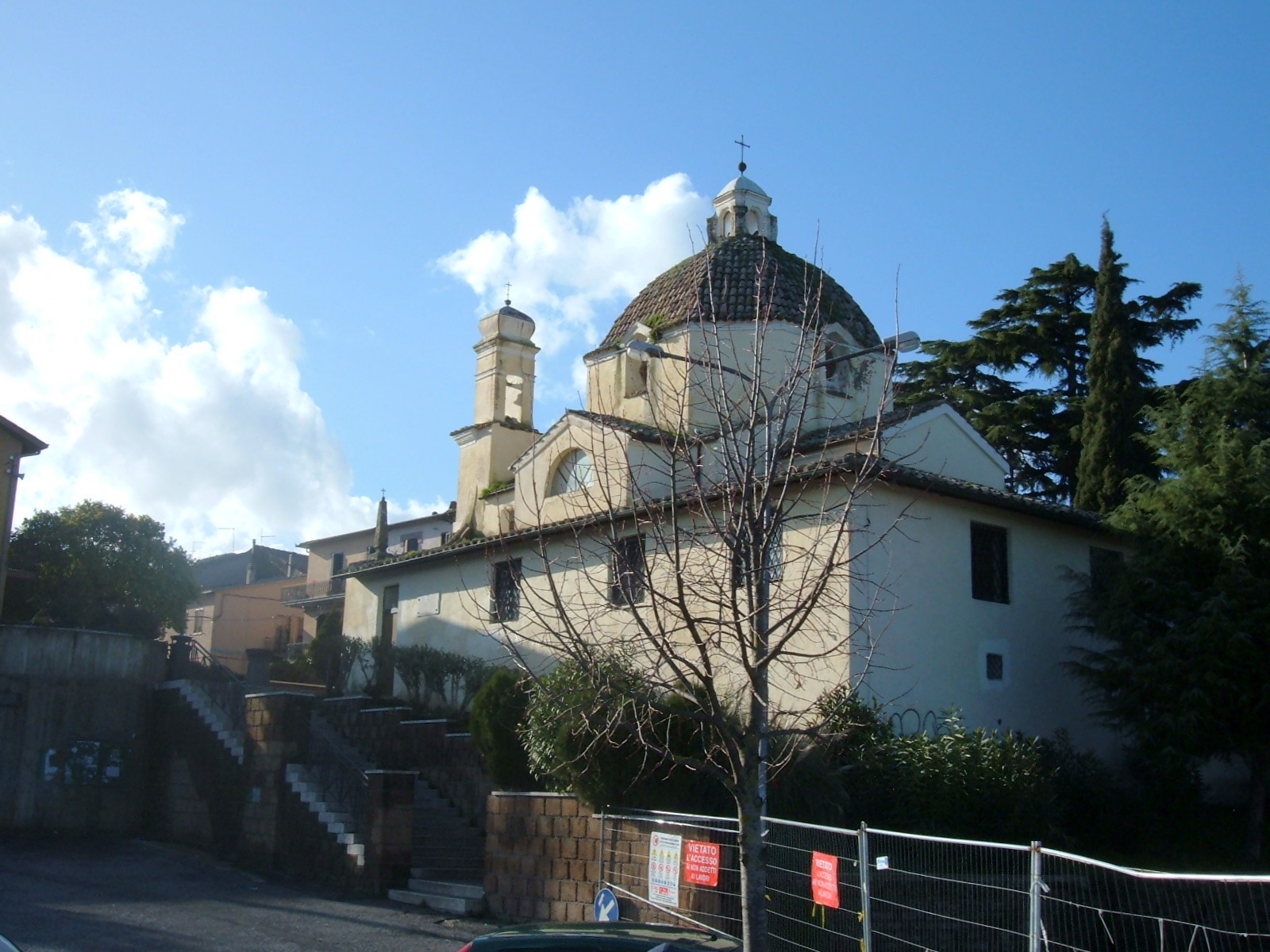 Vista di Monterosi dal piazzale degli autobus.